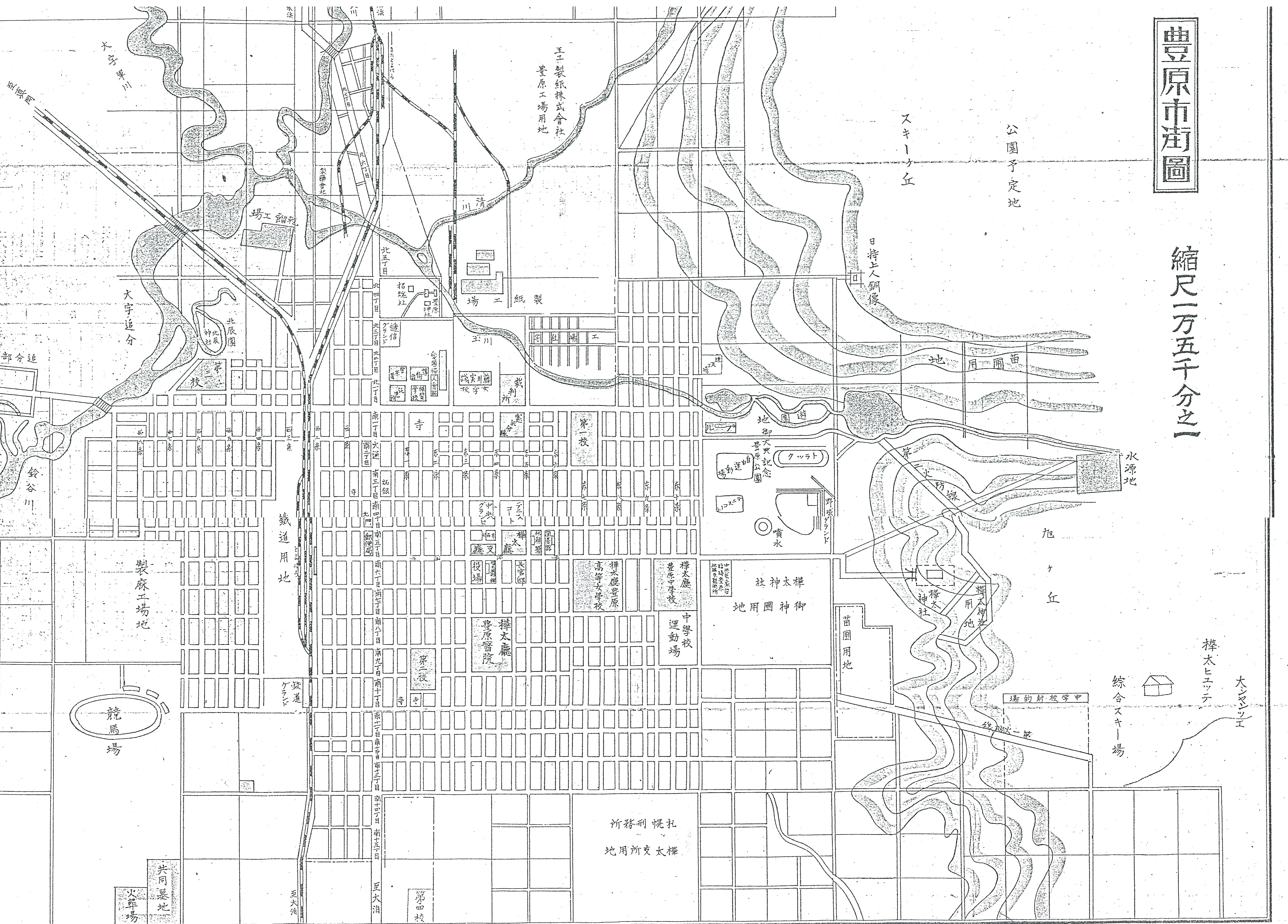 樺太 豊原町 市街図。 1930年代に豊原町役場作成地図（競馬場が豊原駅の南西にあるので早くとも1933年、記録から遅くとも1940年以前の地図)